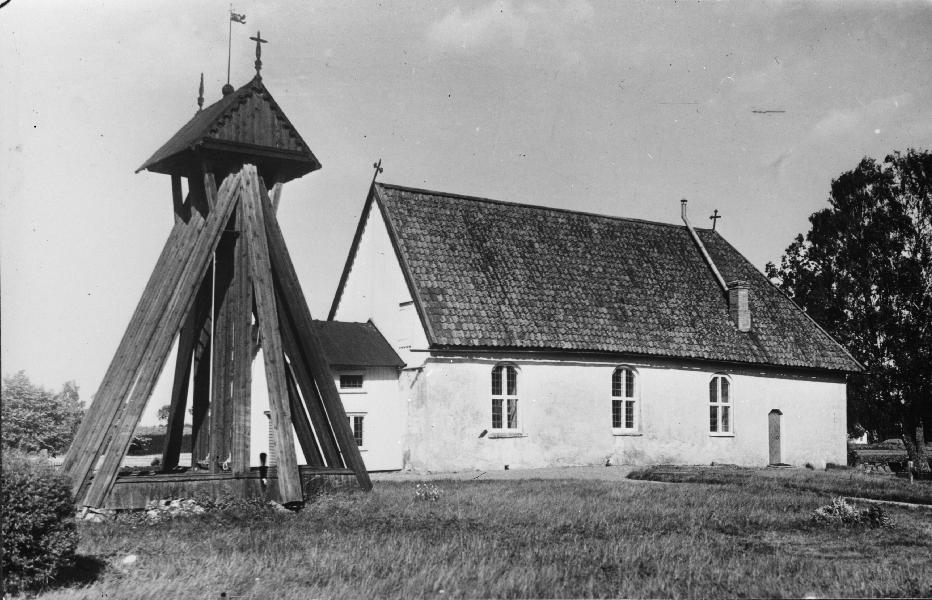 Kyrkan och klockstapeln från sydväst.